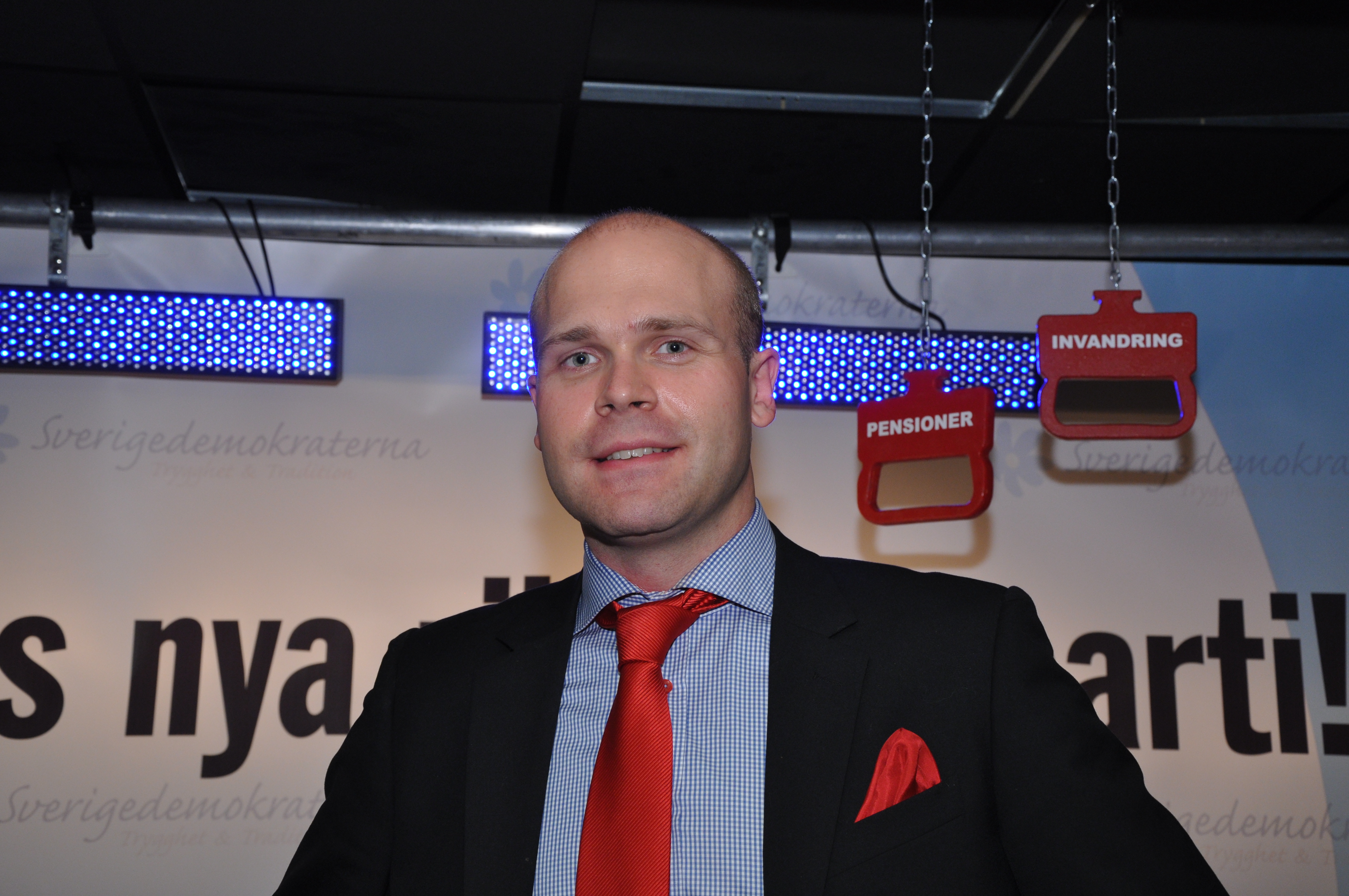 Erik Almqvist, på Sverigedemokraternas valvaka 2010